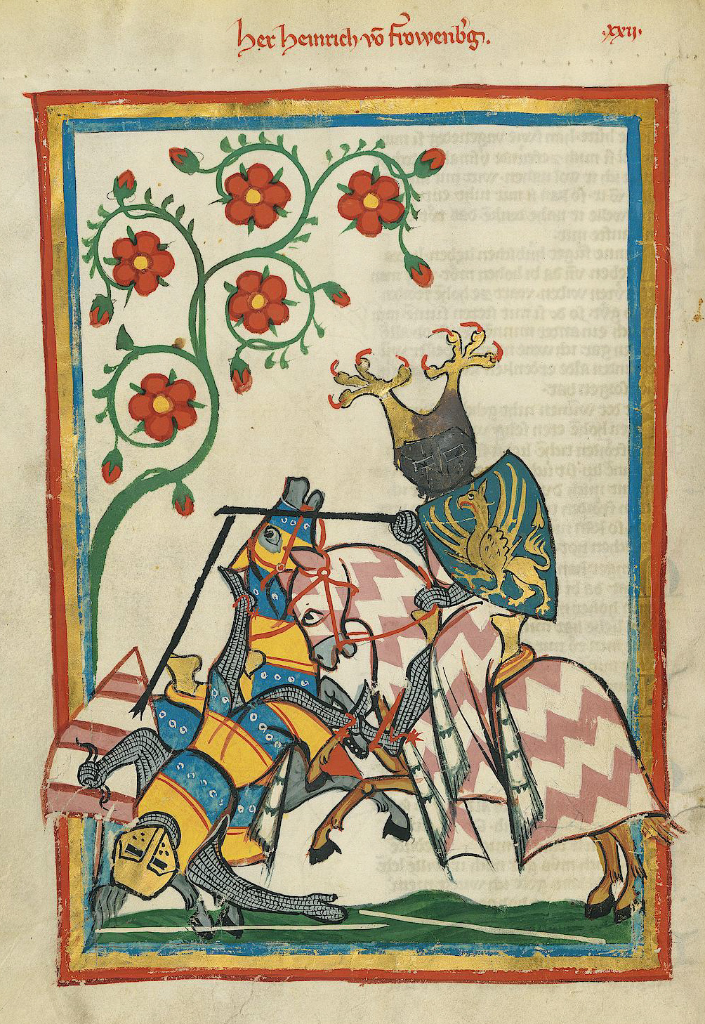 Codex Manesse, UB Heidelberg, Cod. Pal. germ. 848, fol. 61v: Heinrich von Frauenberg